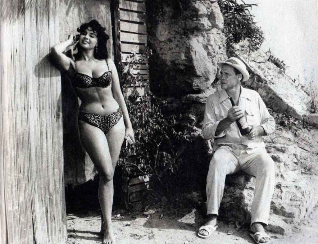 Isabel Sarli y Armando Bó mientras filmaban La Leona (1964)